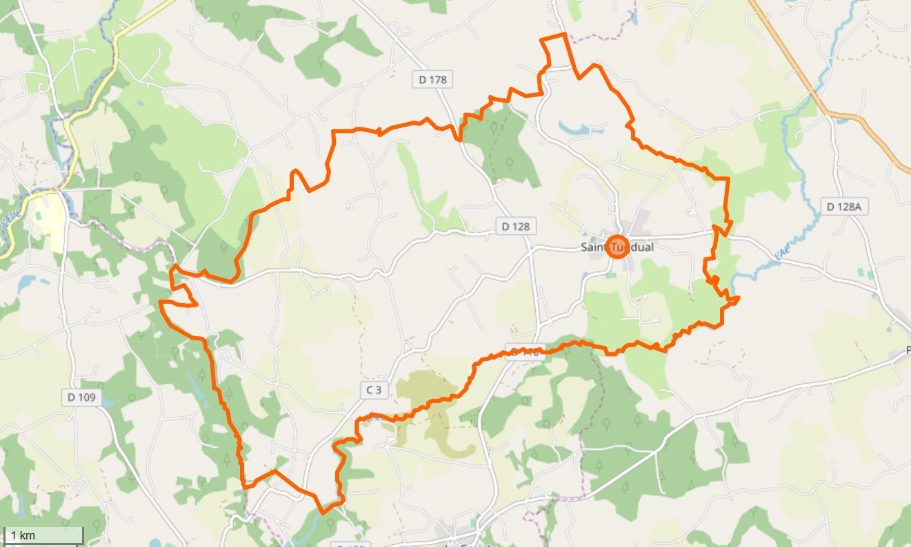 Cette carte a été créée à partir des données du projet Openstreetmap. This map may be incomplete, and may contain errors. Don't rely solely on it for navigation.